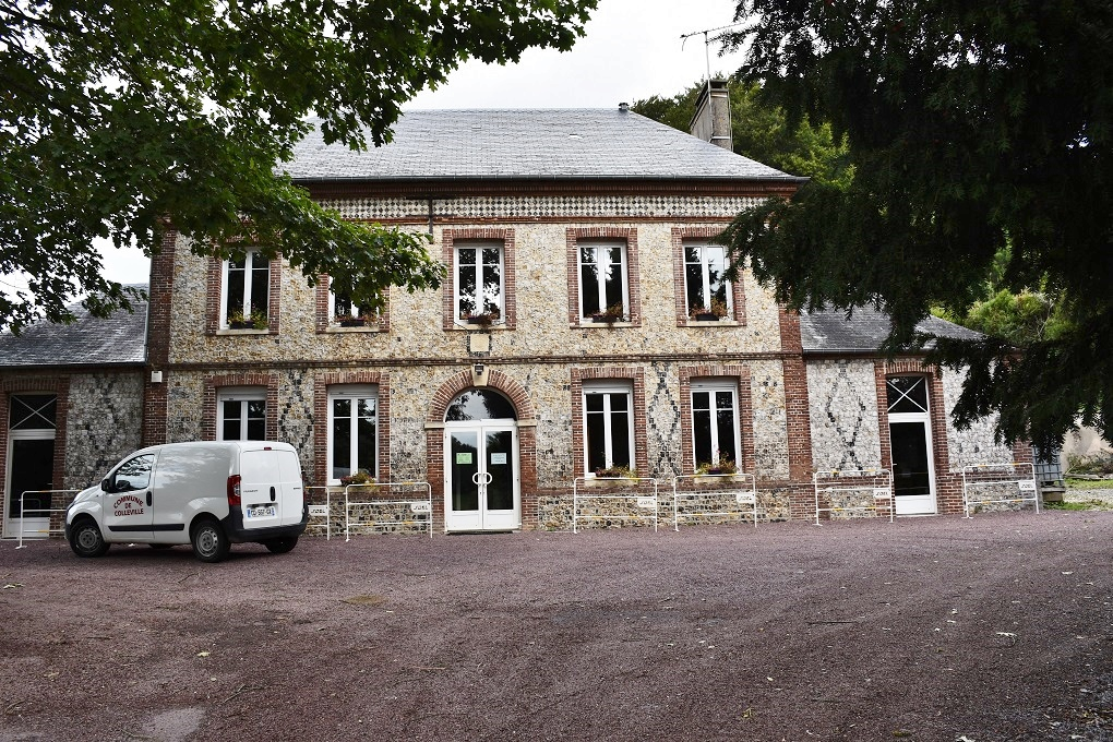 la Marie